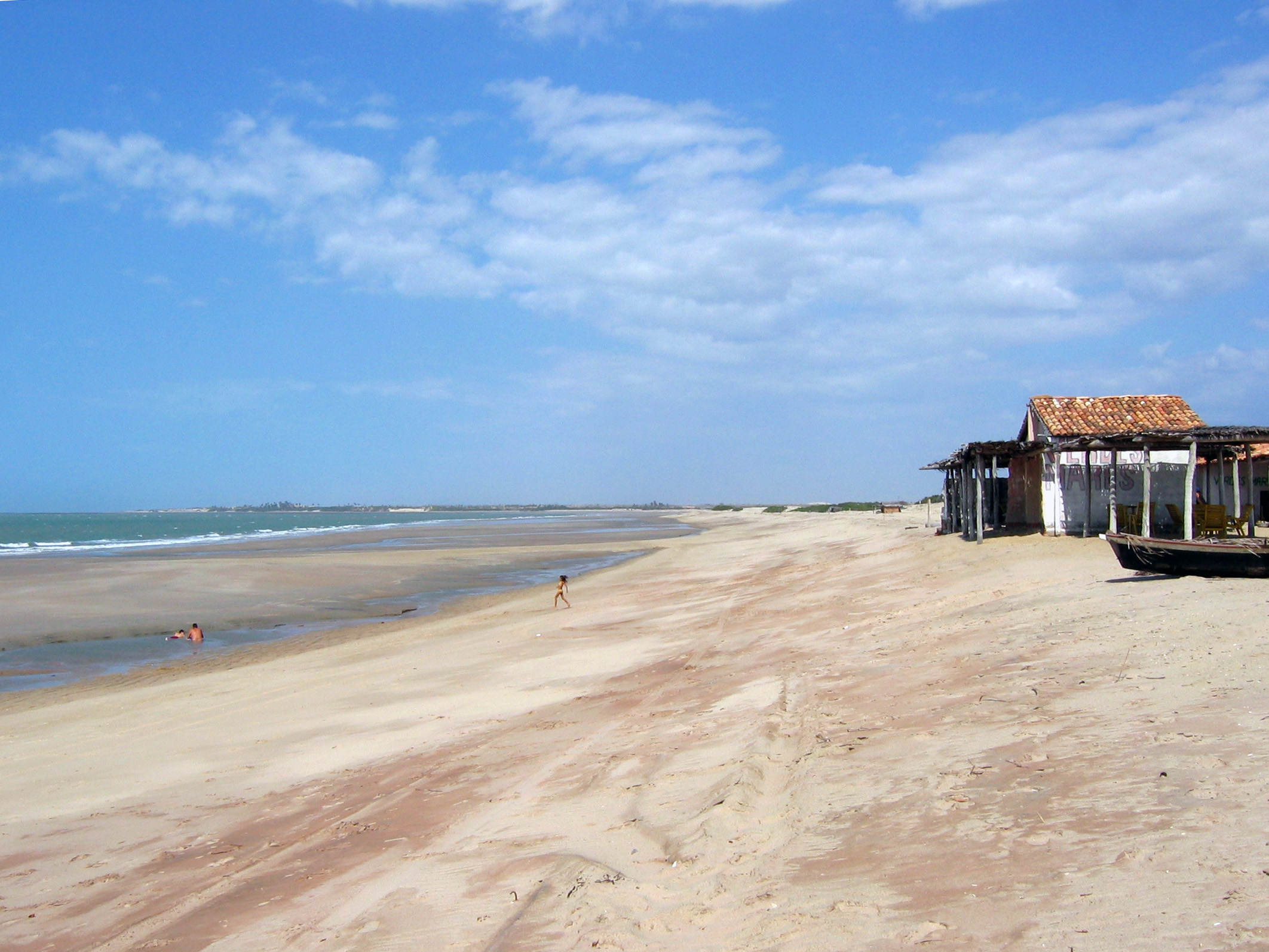 Arrombada beach in Luís Correia, Piauí, Brazil